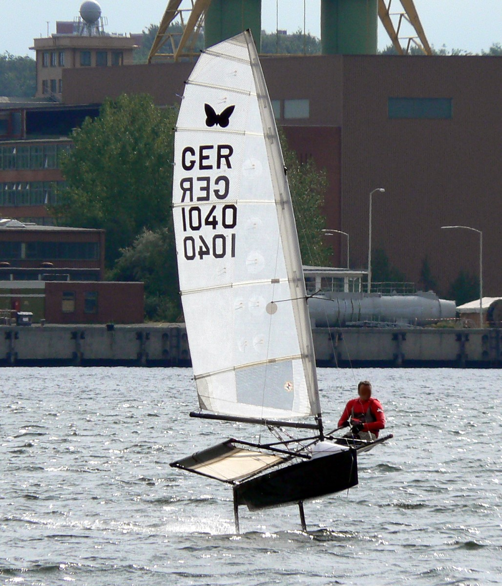 Eine Motte (International Moth Class) beim "Flug" über das Wasser im Kieler Hafen.